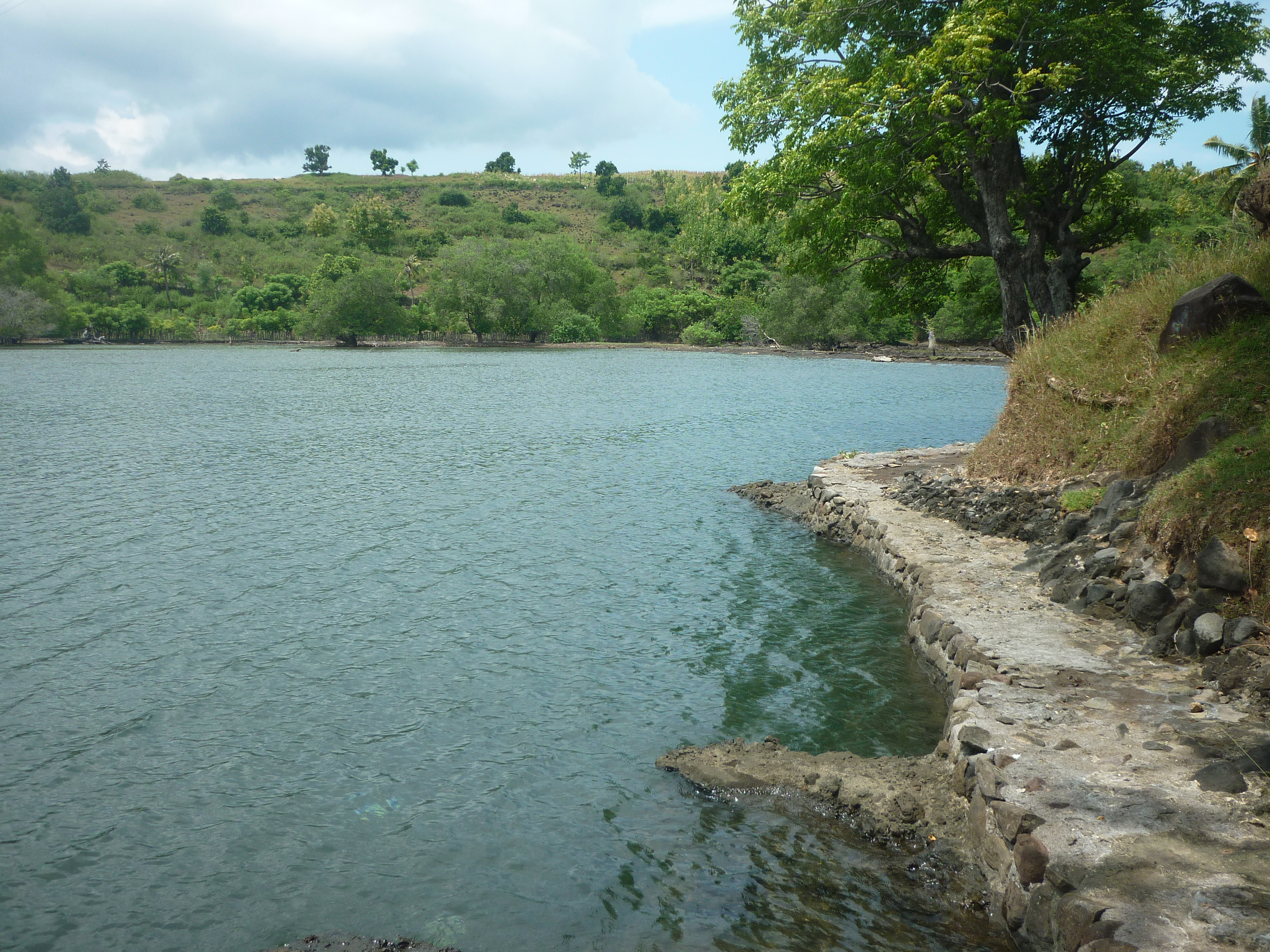 Pemandangan sekitar situs Wadu Pa'a, Sumbawa Indonesia